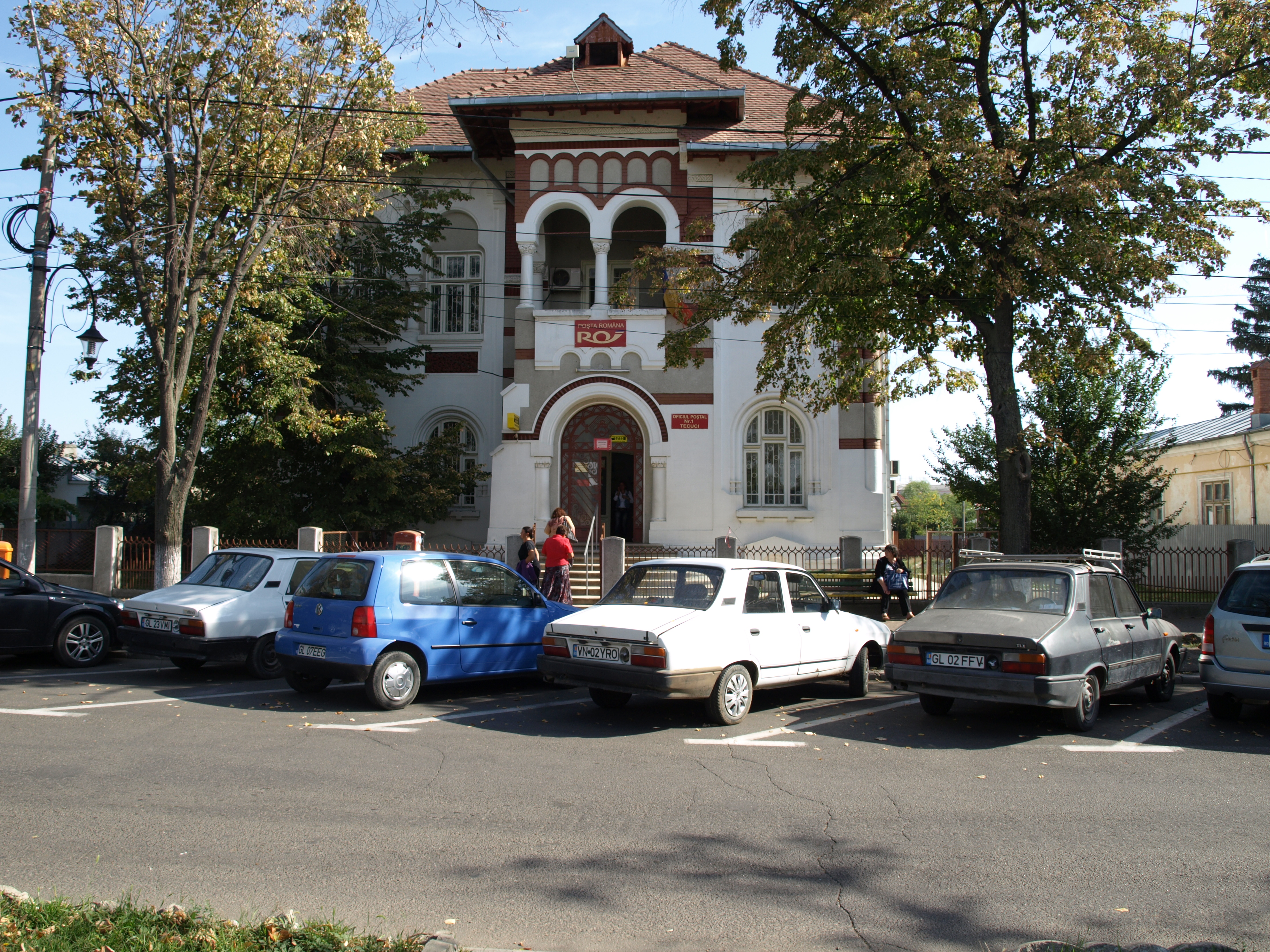 Banca Sindicatului Agricol, azi Poșta Tecuci